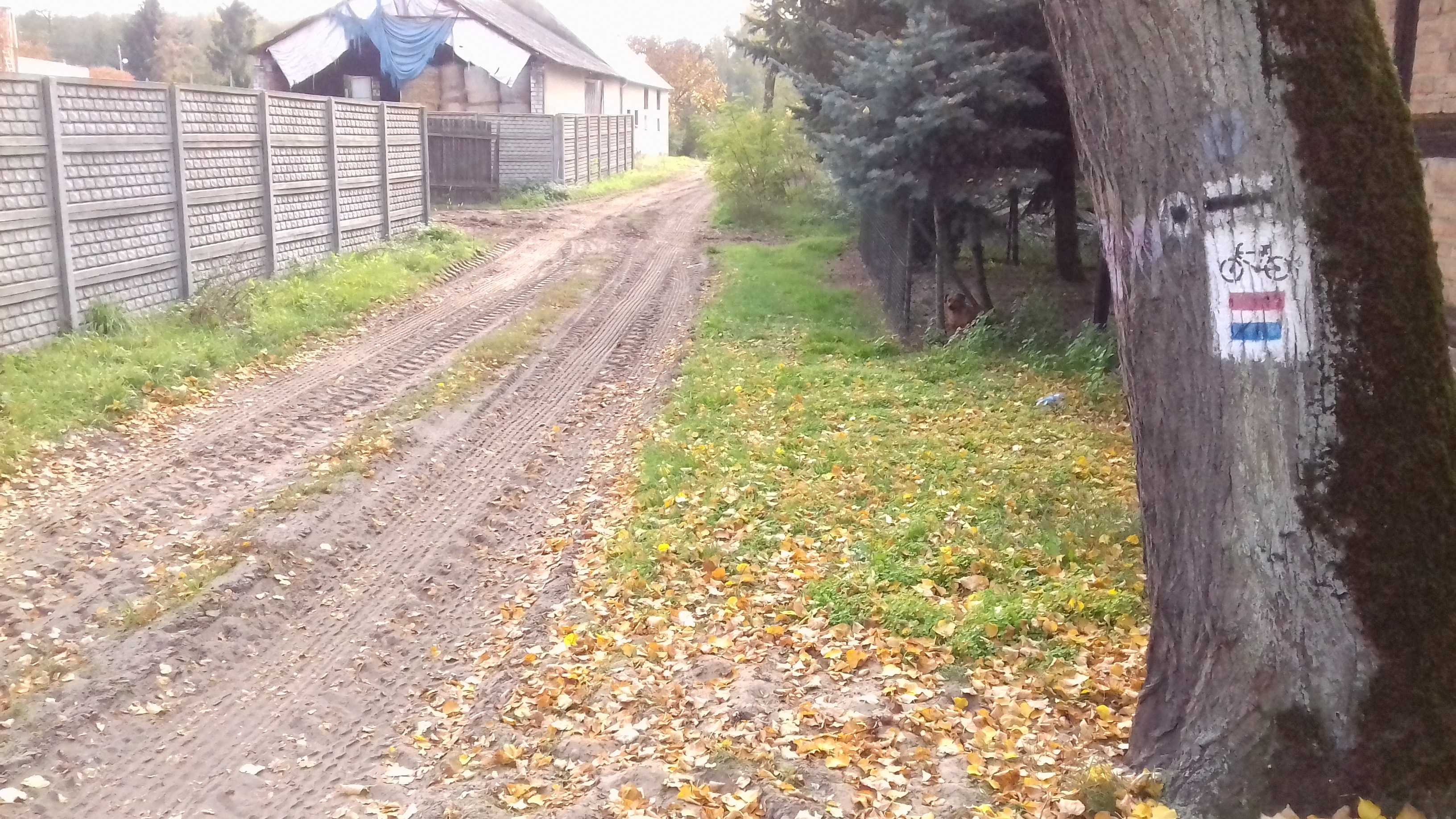 Oznaczenie początku szlaku pieszego nr 3580 (czarnego) w Majdanach.